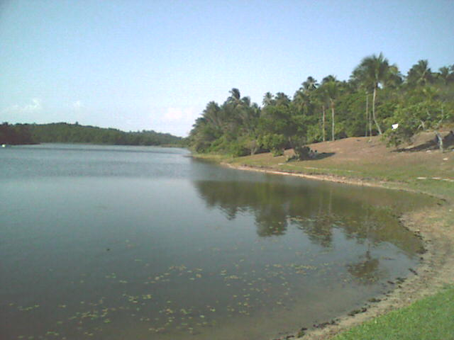 Lagoa do Parque Metropolitano de Pituaçu, Salvador, Bahia, Brasil.